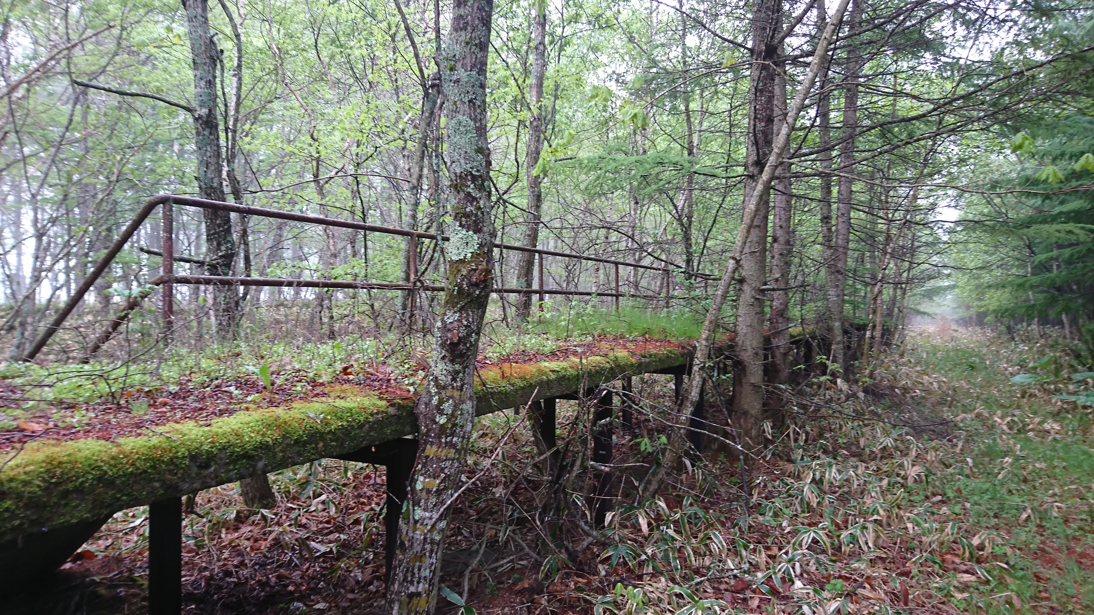 令和2年7月現在の様子